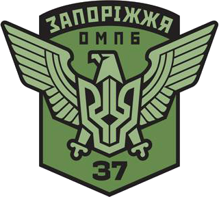 Емблема 37 ОМпБ «Запоріжжя» Збройних сил України на польову форму